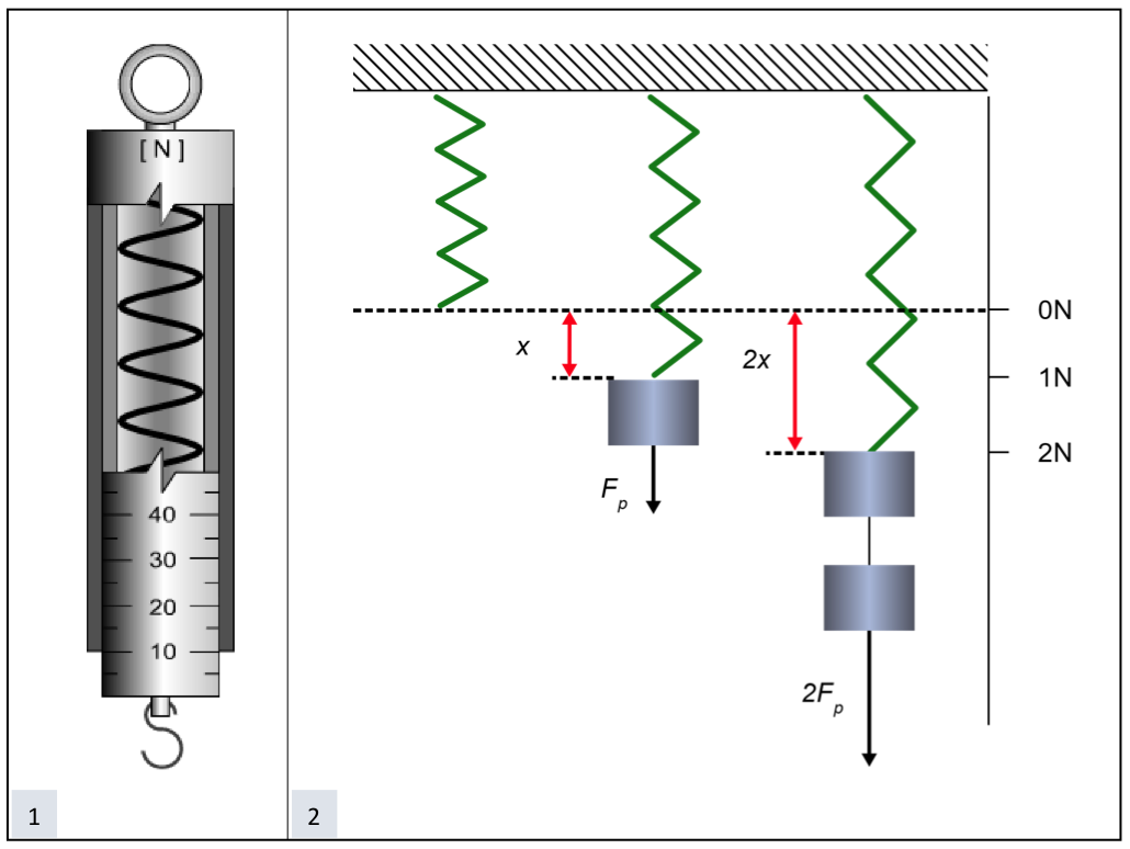 Malgukidun dinamometroaren eskema. "Silomer_25" eta "Dinamometro de resorte" irudien bilketa